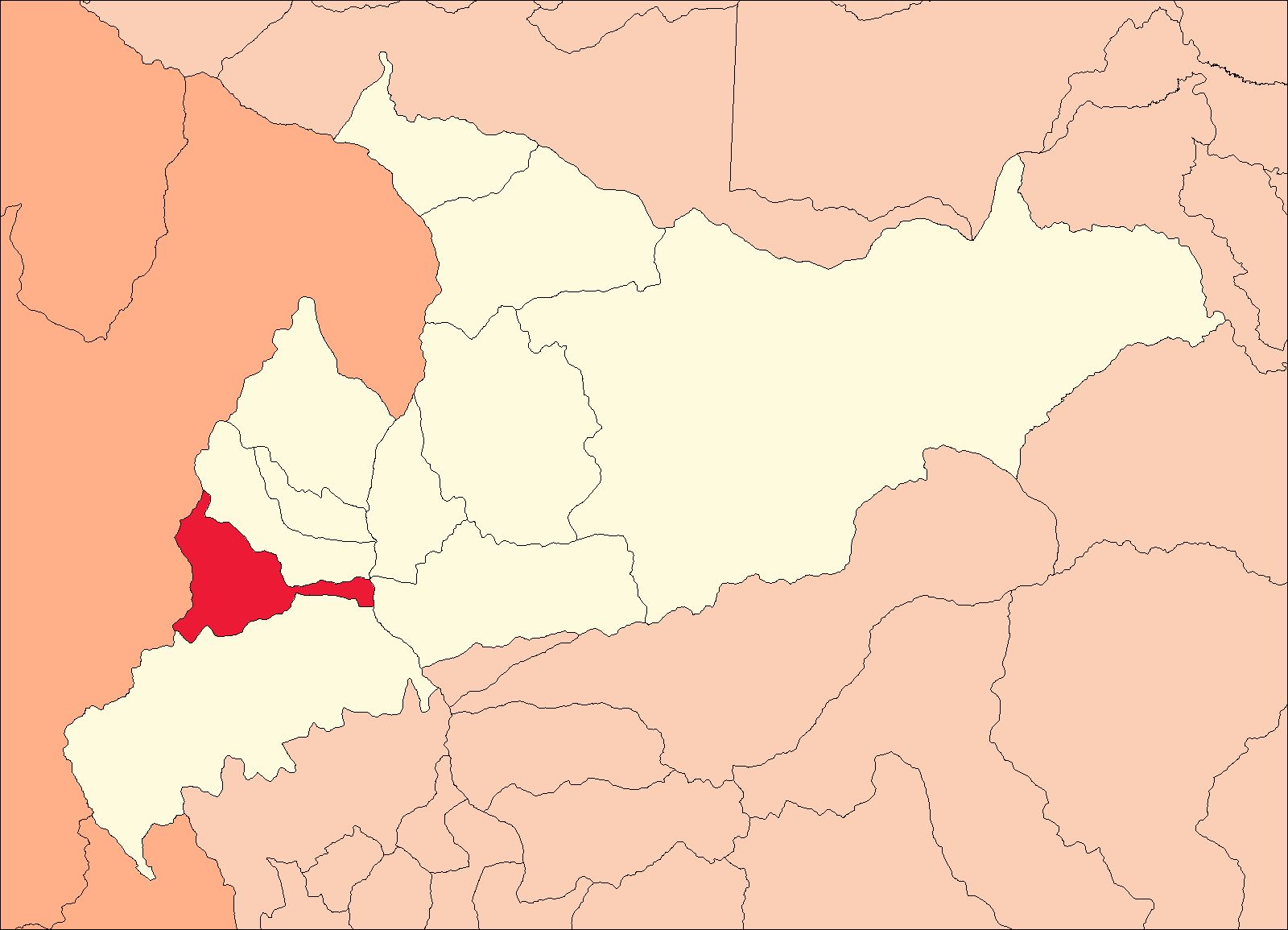 Área del distrito de Puños.